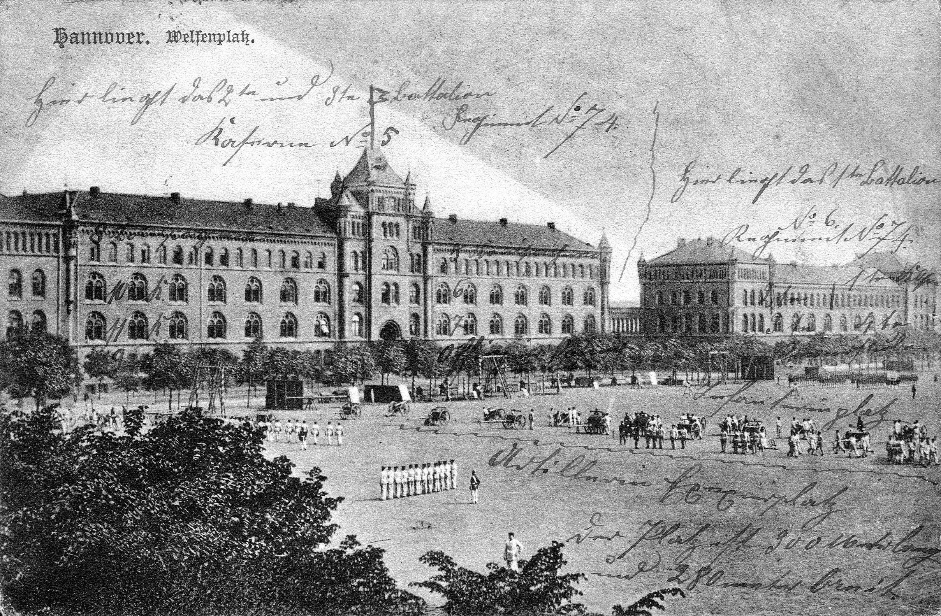 Um 1898: Der Welfenplatz in Hannover, aufgenommen um 1898 aus einem Gebäude in der Celler Straße. Zu sehen sind unter anderem exerzierende und mit Kanonen übende Soldaten/Rekruten vor den Kasernen. Handschriftlich hat der Absender der Karte (siehe unten; Rückseite der Postkarte) auf dem Bild erläutert. Abschrift, oben links: "Hier liegt das 2te und 3te Batailion, Regiment 74, ... No. 5 (darunter:) 5te ... 6te 7te Offizierskasino." Rechts: "Hier liegt das 1te Batailion No. 6 / Regiment No. 74 / 1te 2te 3te 4te / Infanterieplatz / Artillerie Exzerzierplatz / Der Platz ist 300 Meter lang und 280 Meter breit." Vor den Gebäuden ist eine Allee aus relativ frisch angepflanzten Bäumen zu erkennen Lediglich das Gebäude rechts ist heute noch erhalten und dient der Polizeidirektion Hannover. Anstelle des linken Gebäudes befindet sich heute die Albrecht-Dürer-Schule, im Vordergrund heute die Werner-von-Siemens-Schule. Es existiert eine Variante dieser Ansichtskarte, auf der auf der Bildseite der Platz gelassen wurde für persönliche Nachrichten.